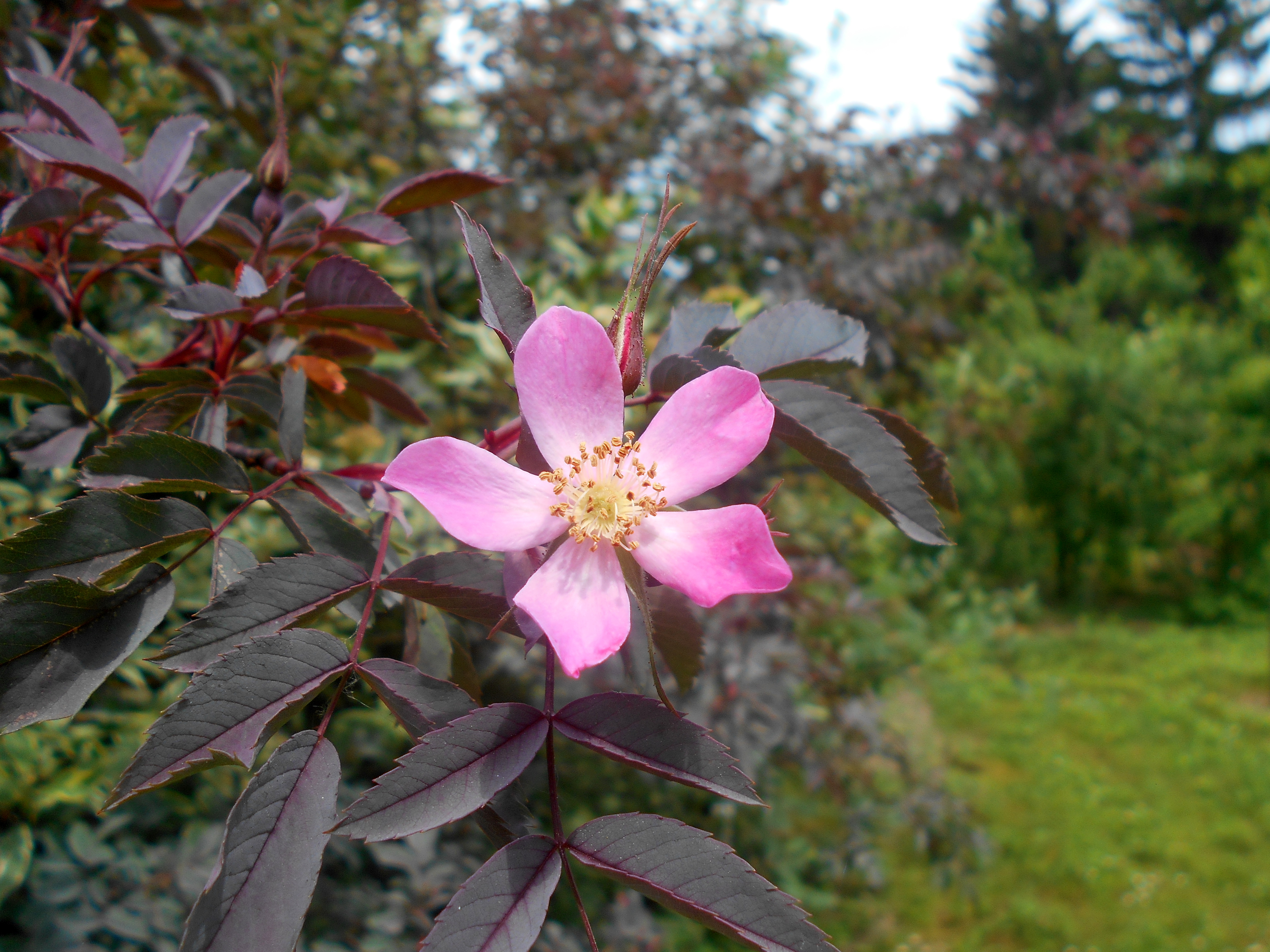 Róża czerwonawa (Rosa glauca), Ogród Botaniczny UMCS w Lublinie.